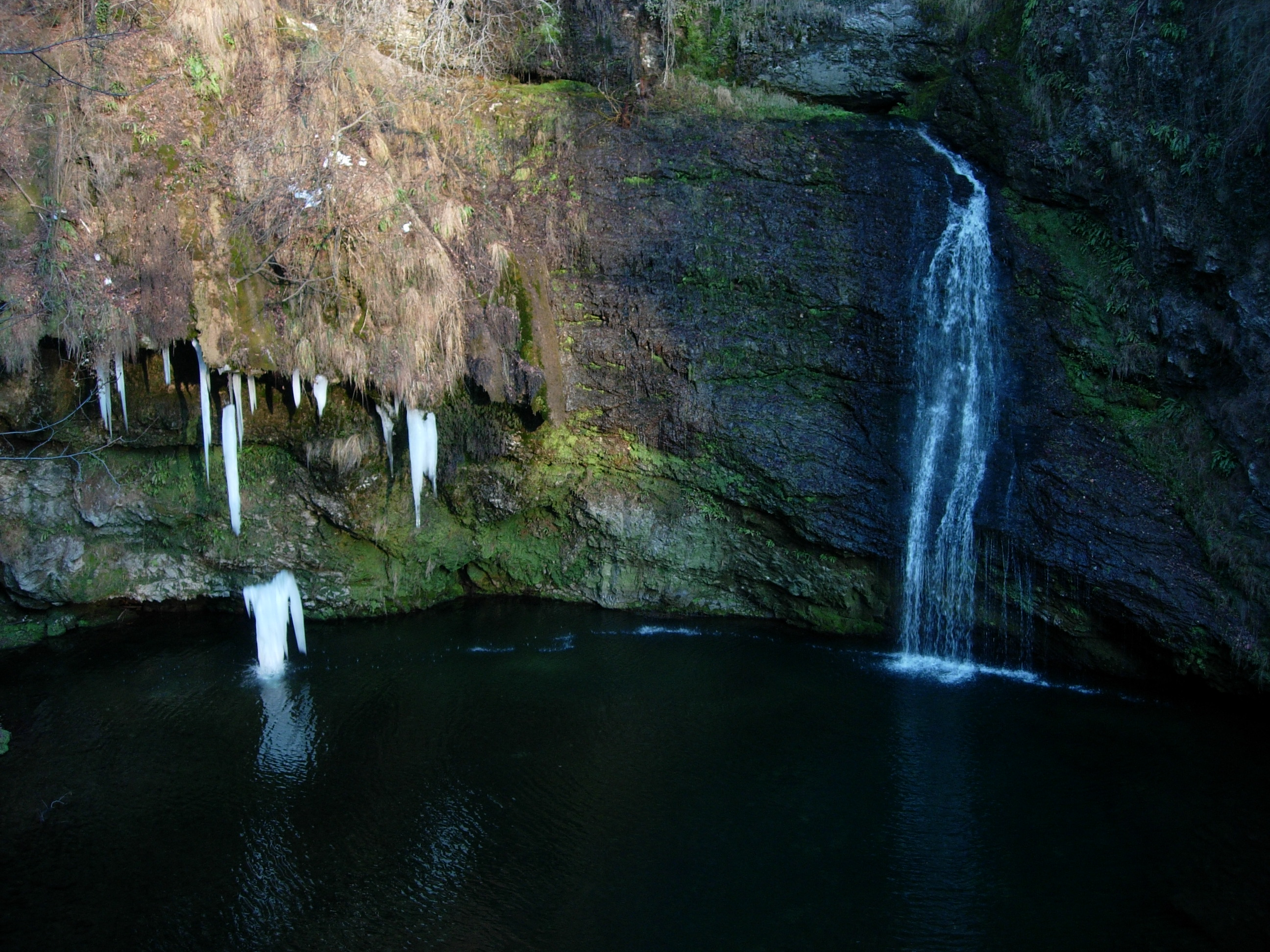 Scatto invernale della cascata di Ferrera di Varese durante la caduta di una stalattite di ghiaccio.